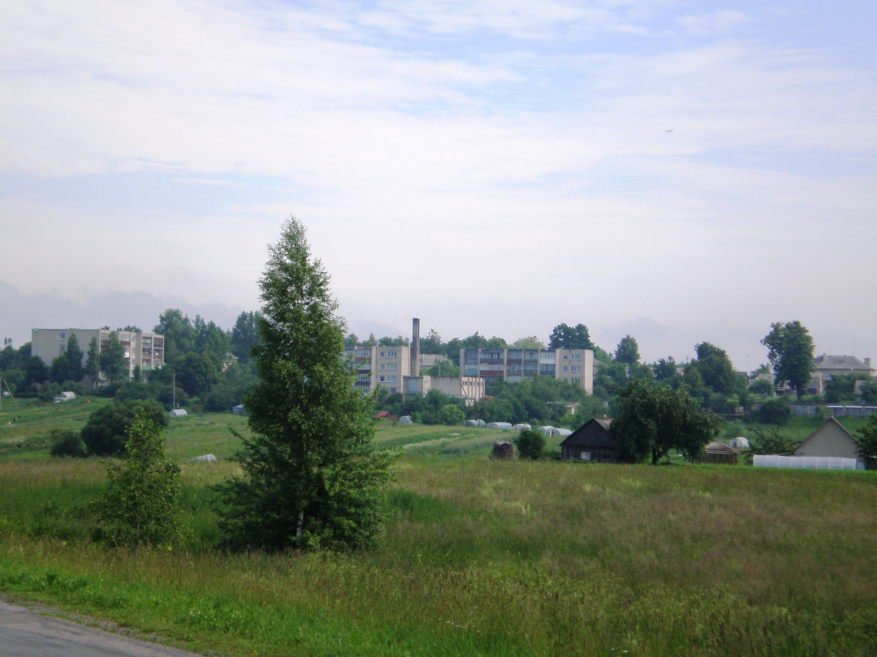 Jieznas, Prienų raj.